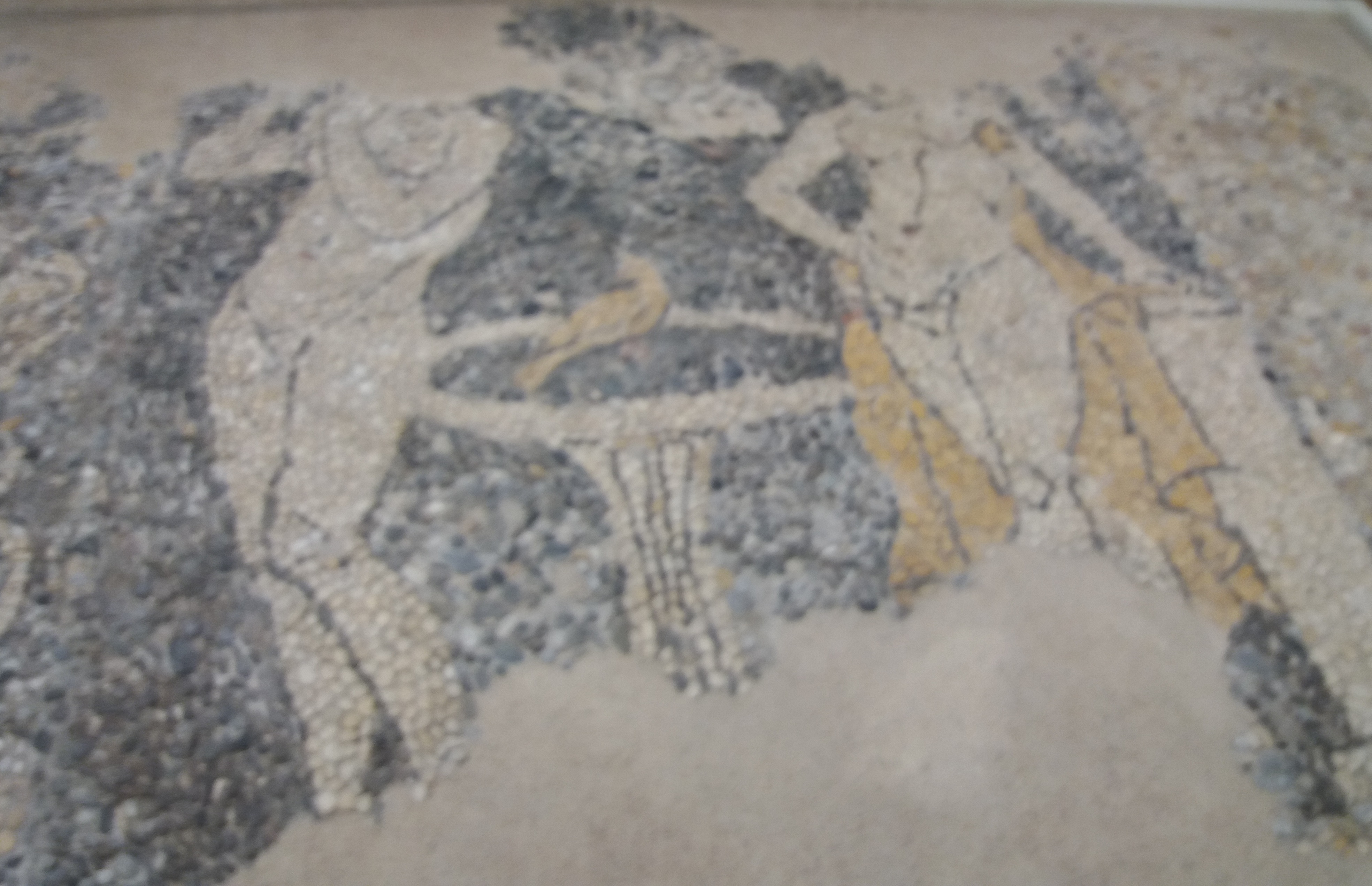 Девушки у фонтана. Херсонес.